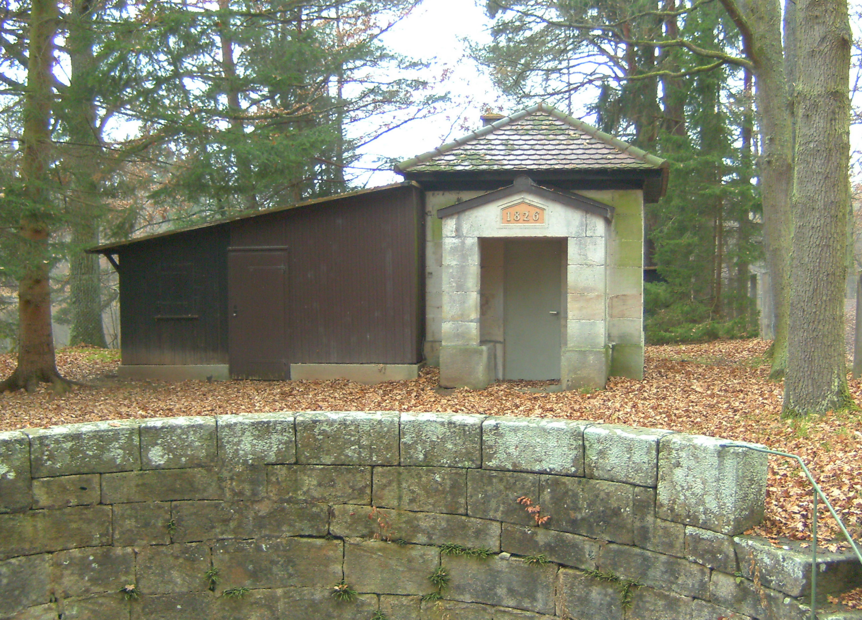 Reglerhäuschen von 1826 am Ausfluss des Pfaffensees zum Christoph- und Metzgerhaustollen; NSG „Rotwildpark bei Stuttgart“. – Parkseen im Paffenwald Stuttgart. Wasserversorgung und Parkgebiet beim Bärenschlössle.